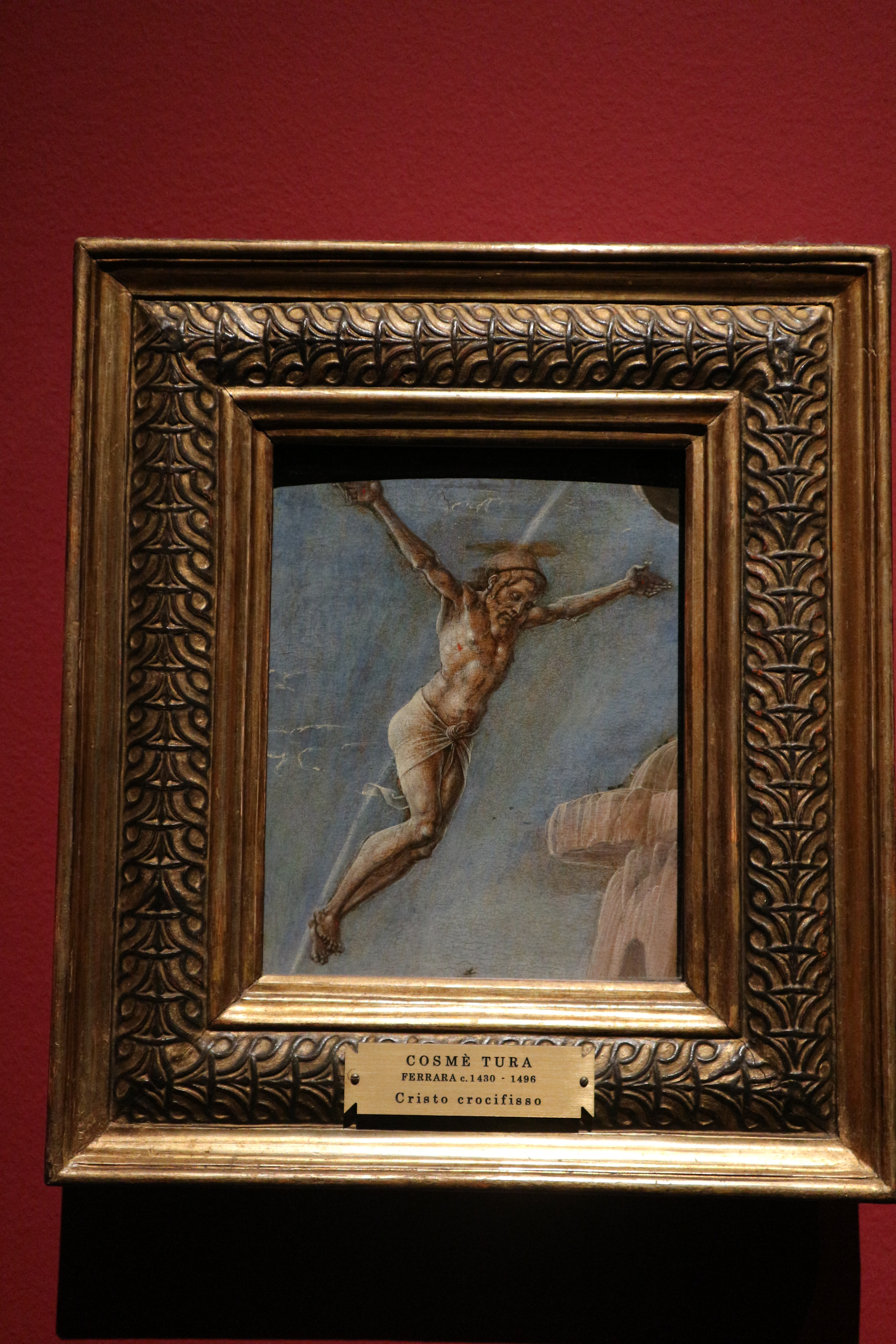 Cristo crocifisso, Cosmè Tura, Milano, Pinacoteca di Brera